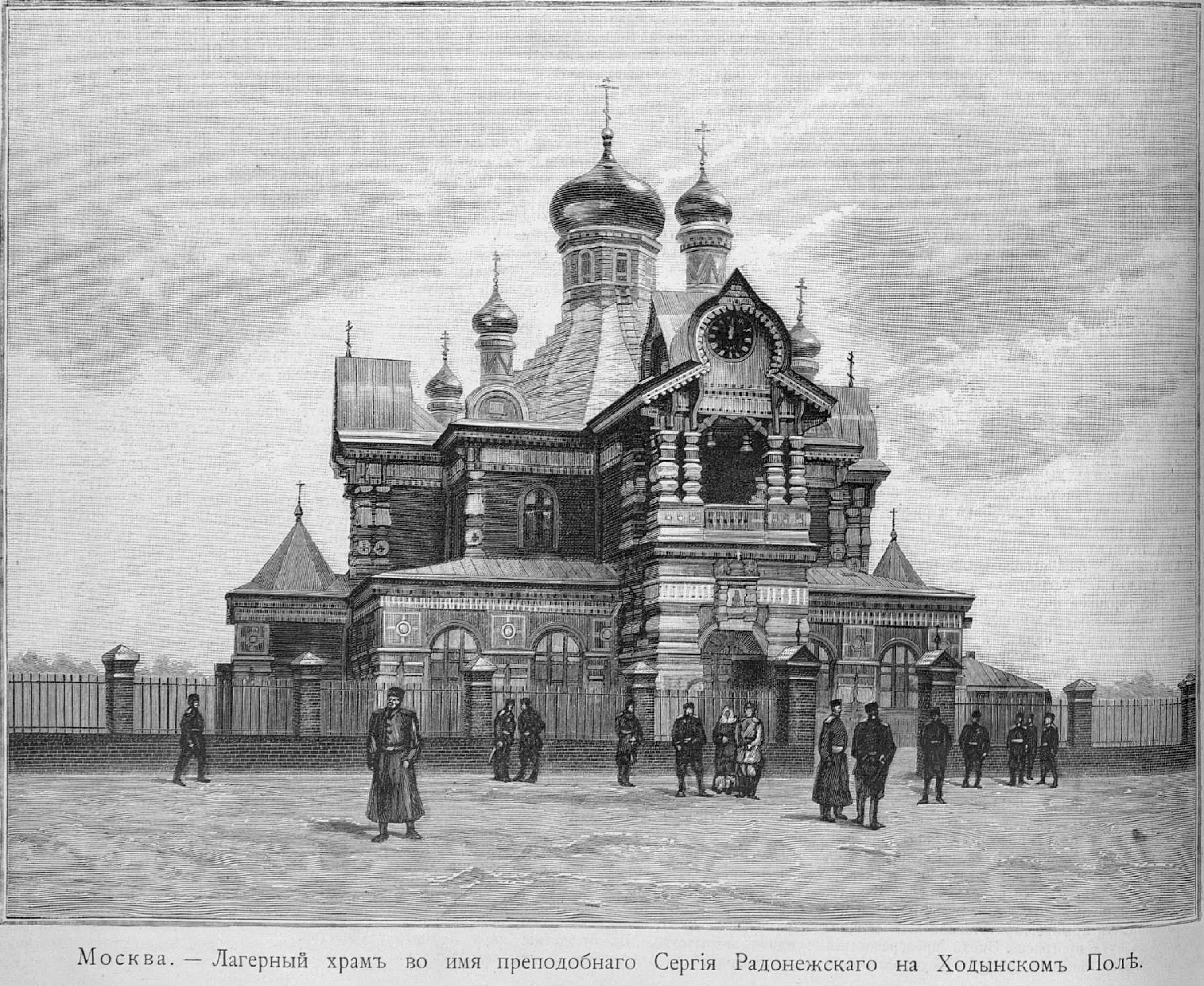 Храм Сергия Радонежского на Ходынском поле, конец XIX века.